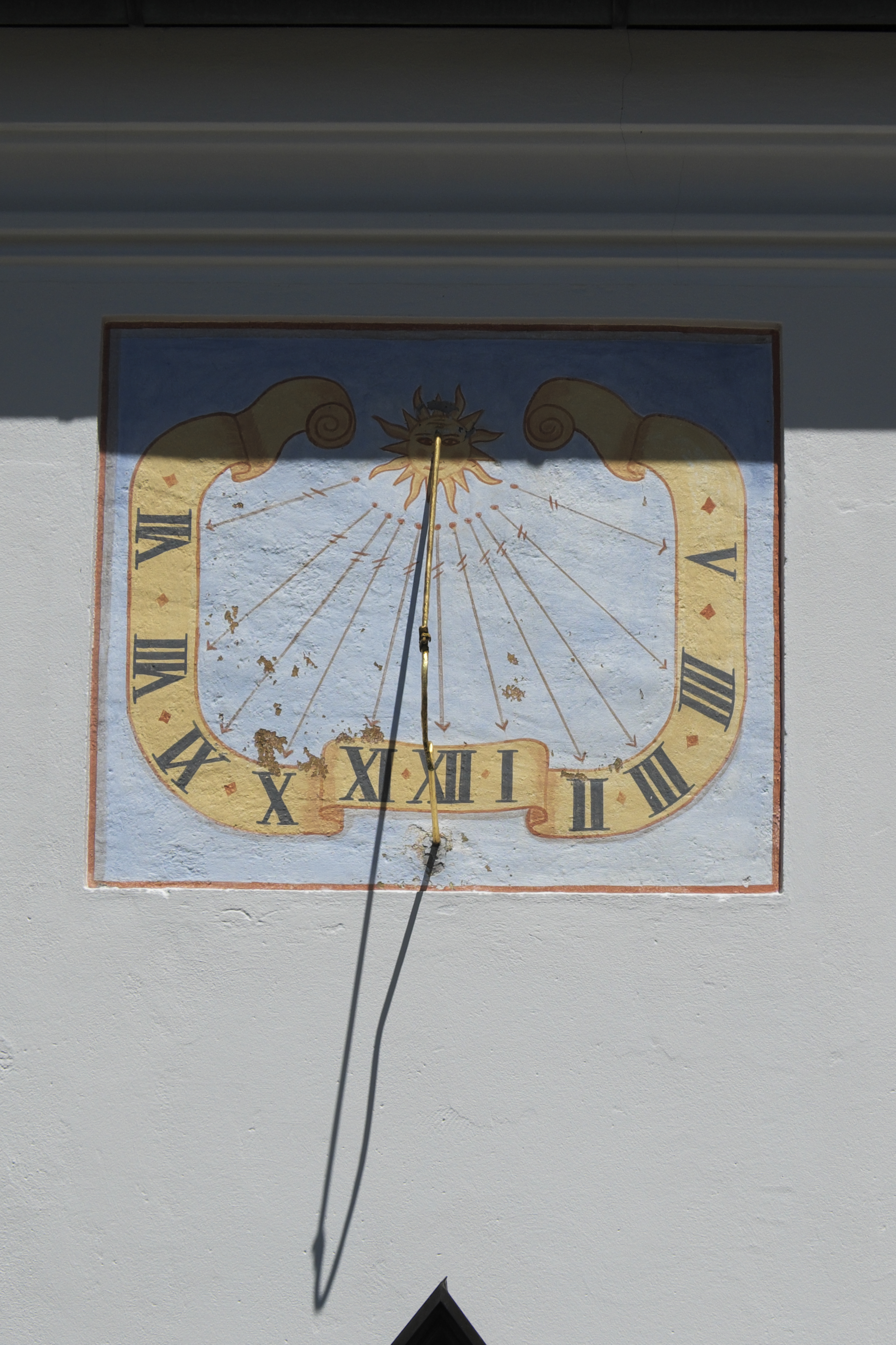 Katholische Filialkirche St. Johannes der Täufer in Hadorf (Starnberg) (Bayern, Deutschland), Sonnenuhr